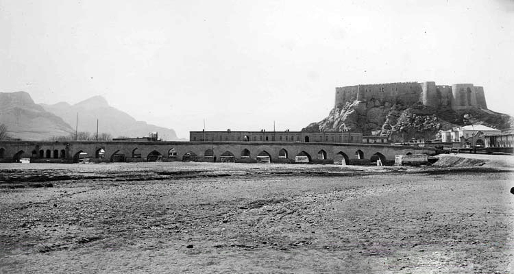 پل صفوی یا پل گپ یک پل تاریخی متعلق به دوره صفوی می‌باشد. این پل در مرکز شهر خرم‌آباد قرار دارد و بخش غربی مرکز شهر را به بخش شرقی متصل می‌کند. ساختمان این پل شباهت فراوانی با ساختمان پل خواجو دارد و همانند آن دارای شاه‌نشین بوده که بر اثر سیل از بین رفته است.